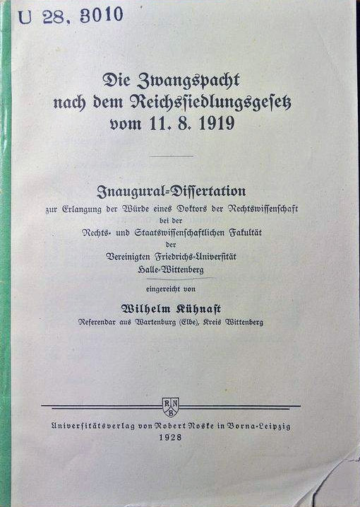 Deckblatt der Disserationsschrift von Wilhlem Kühnast